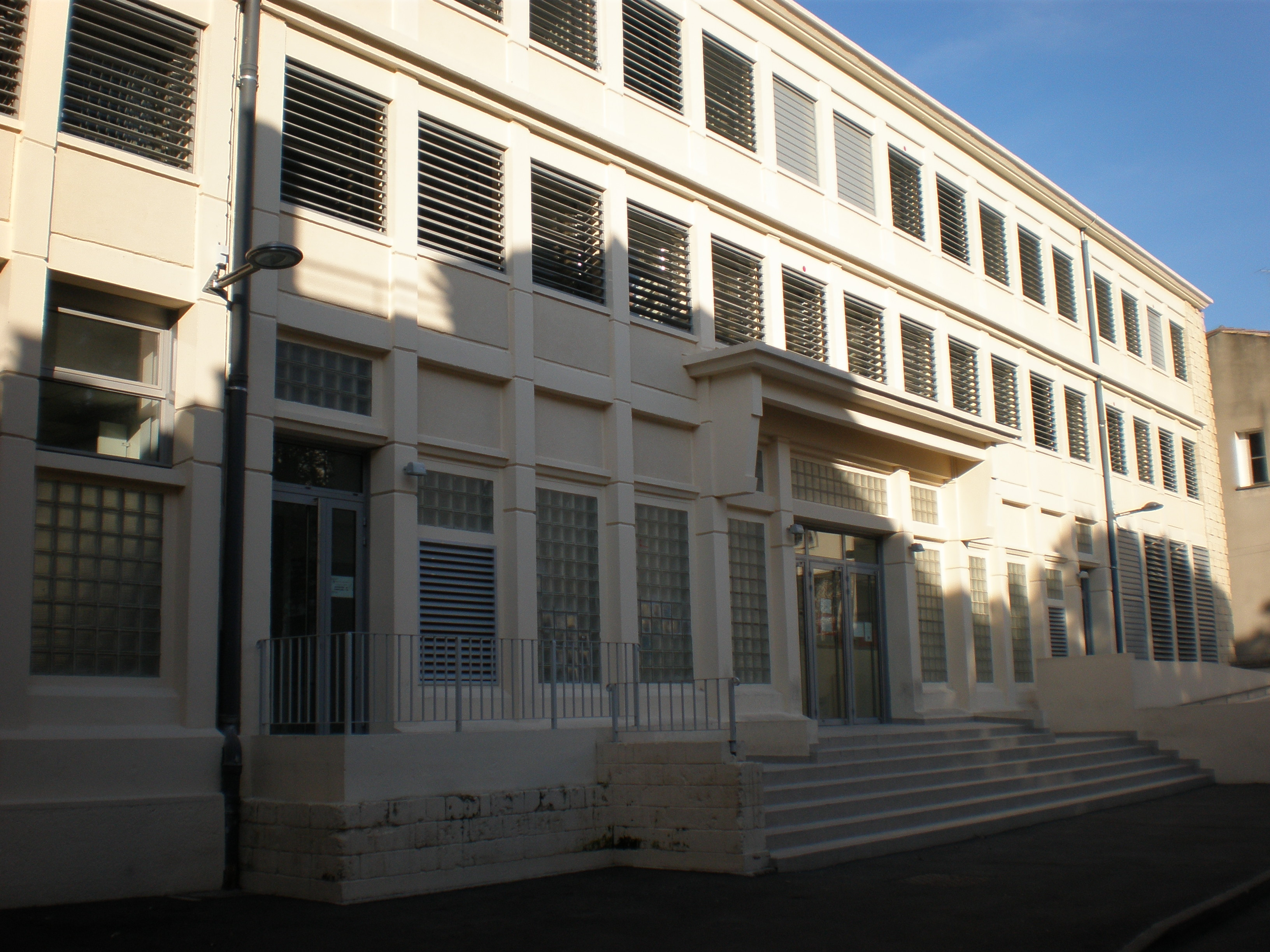 Le bâtiment 3 de l'UFR Droit de Montpellier, rue de l'Arc des Mourgues (Université Montpellier 1)